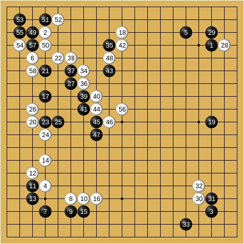 第4期名人戦挑戦手合七番勝負第3局 1965年8月19-20日 坂田栄男名人(先番)-林海峰 1-56手